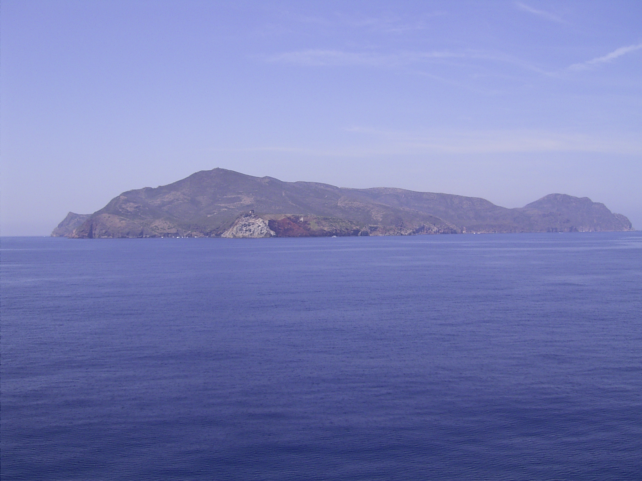 Capraia, Tuscan Archipelago